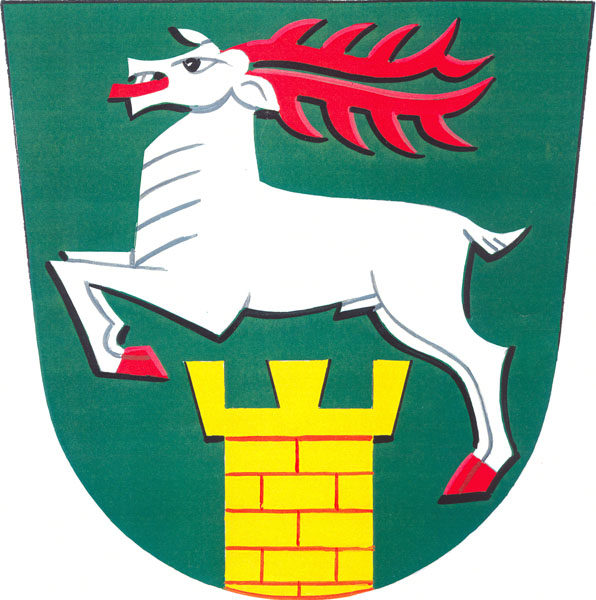 Znak obce Mrlínek